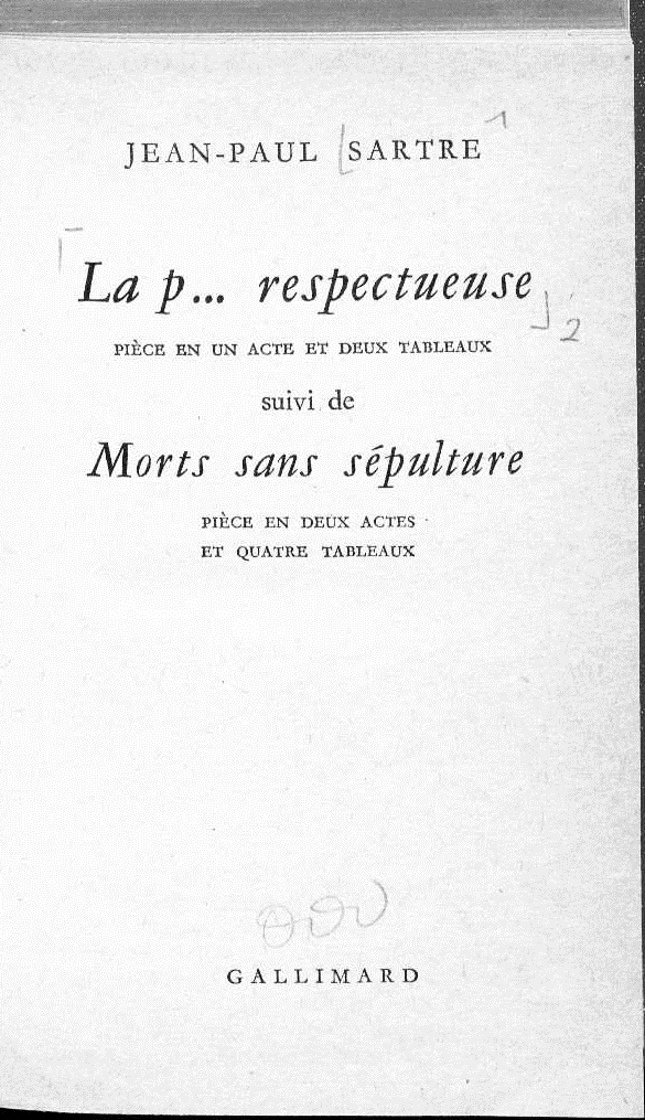 Jean-Paul Sartre La P...respectueuse Gallimard Titre